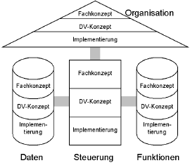 eigene Darstellung, nach: Scheer, A.-W.: Architektur integrierter Informationssysteme - Grundlagen der Unternehmensmodellierung, Berlin et al. 1991, S. 18.